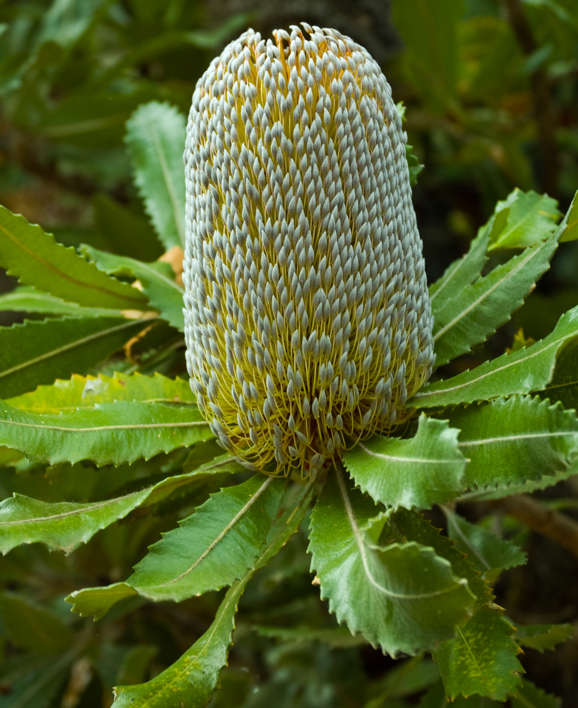 Banksia Serrata, Proteaceae, Australian Flora